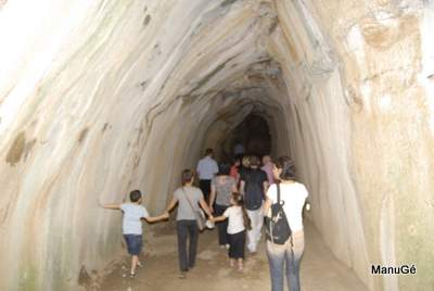 Grotte naturelle utilisée pour la conservation des aliments